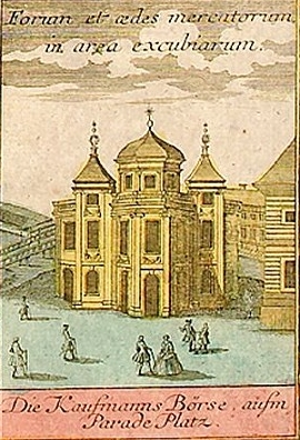 Ansicht der Berliner Börse im Neuen Lusthaus am Lustgarten in Berlin, 1750.